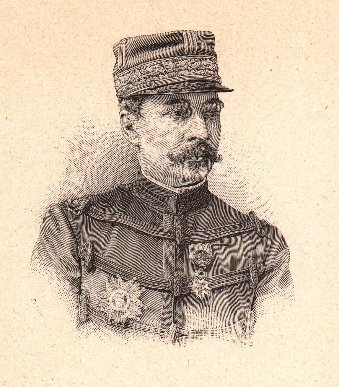 French general Alfred Dodds (1842-1922)